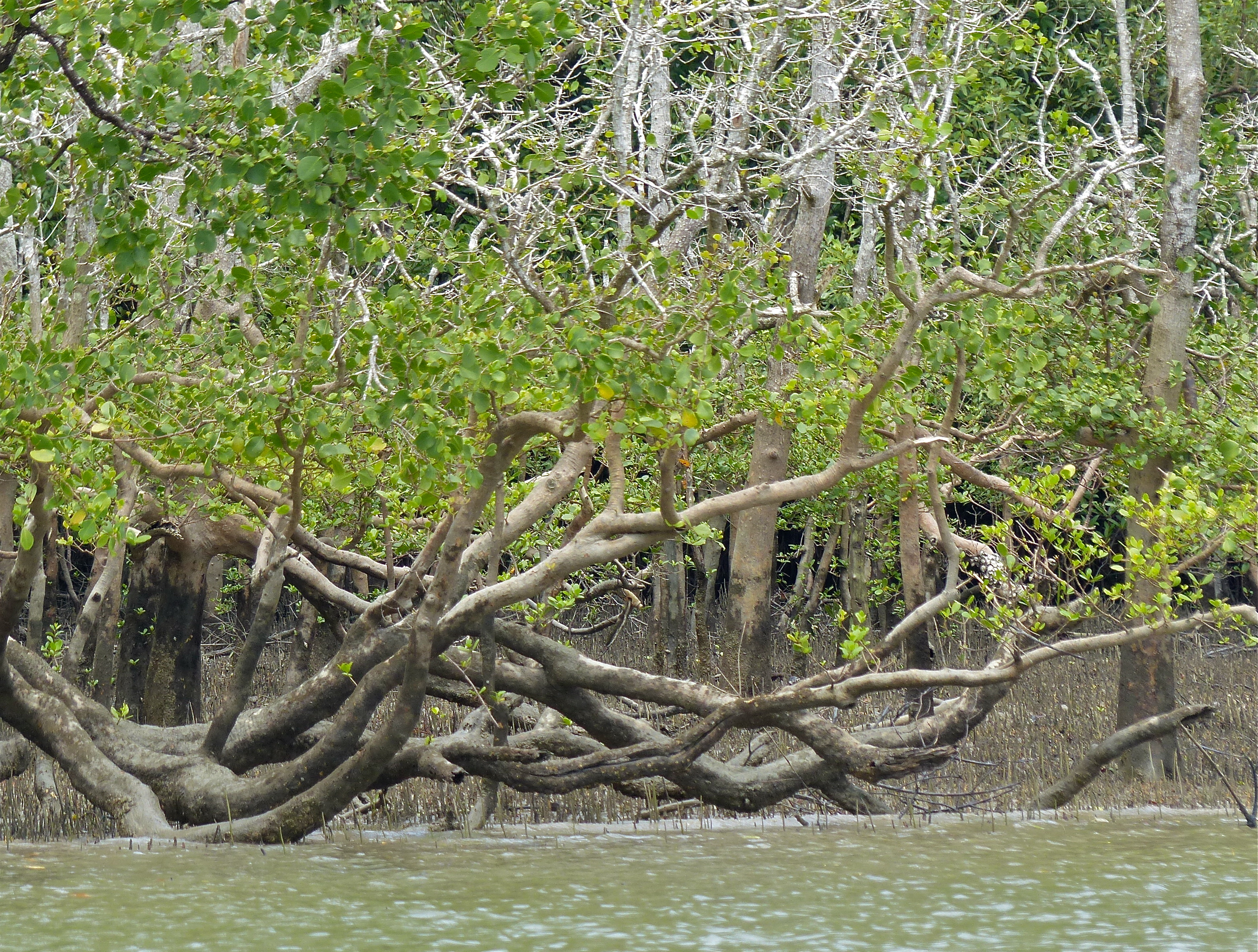 Batang Salak Estuary North of Kuching, Sarawak, MALAYSIA